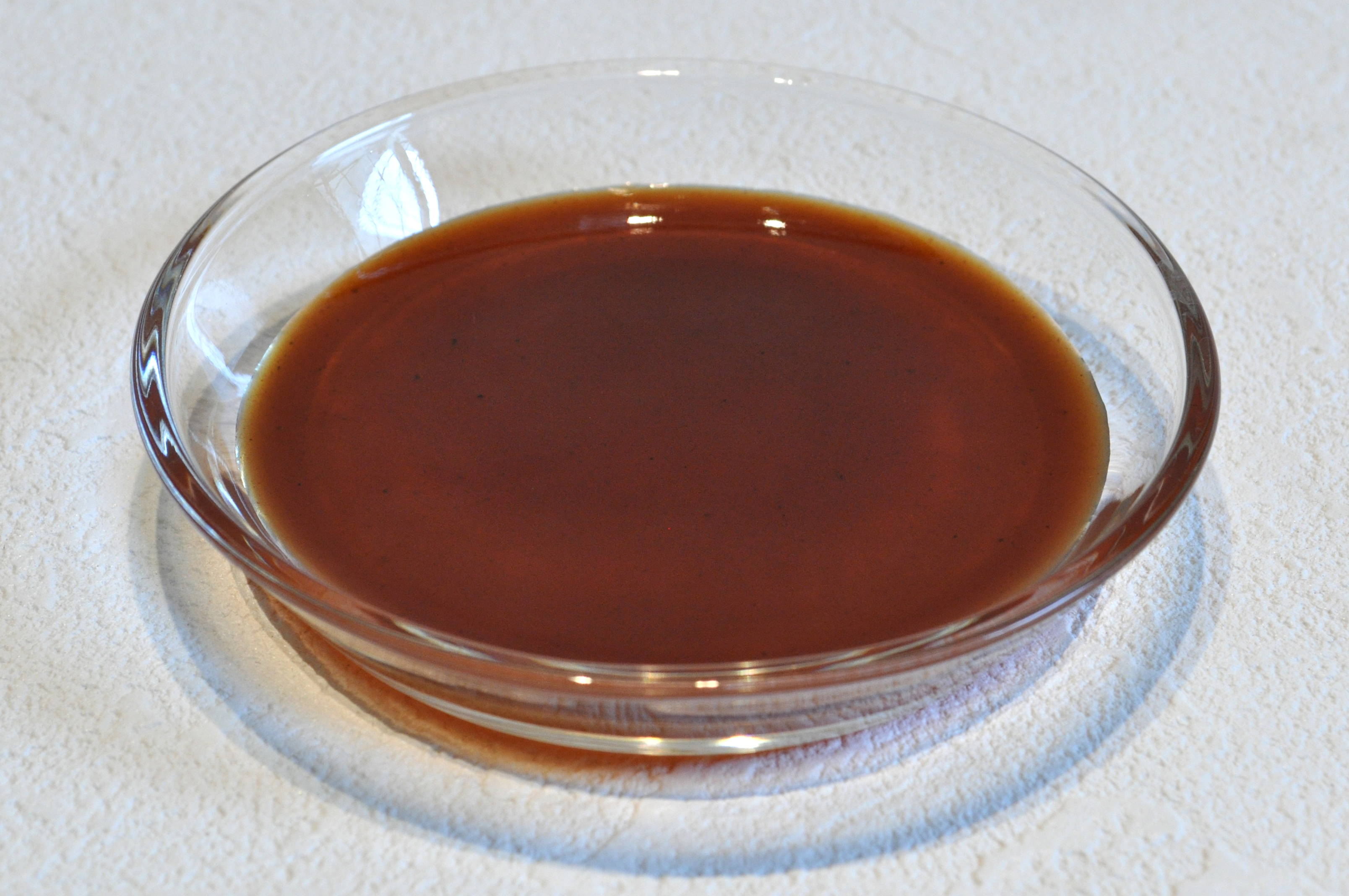 ウスターソース（中濃）